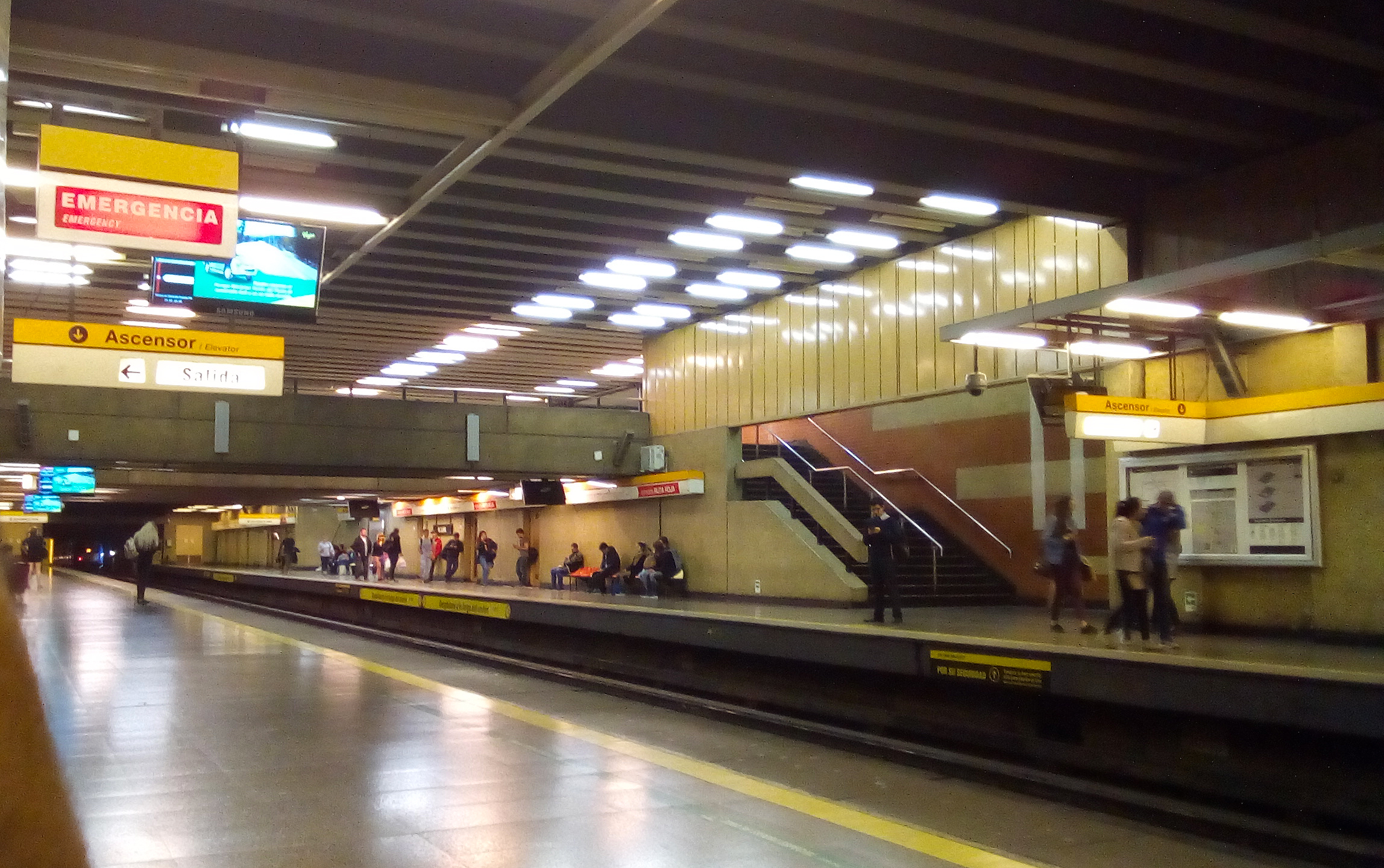 Andenes de la estación El Llano del Metro de Santiago.